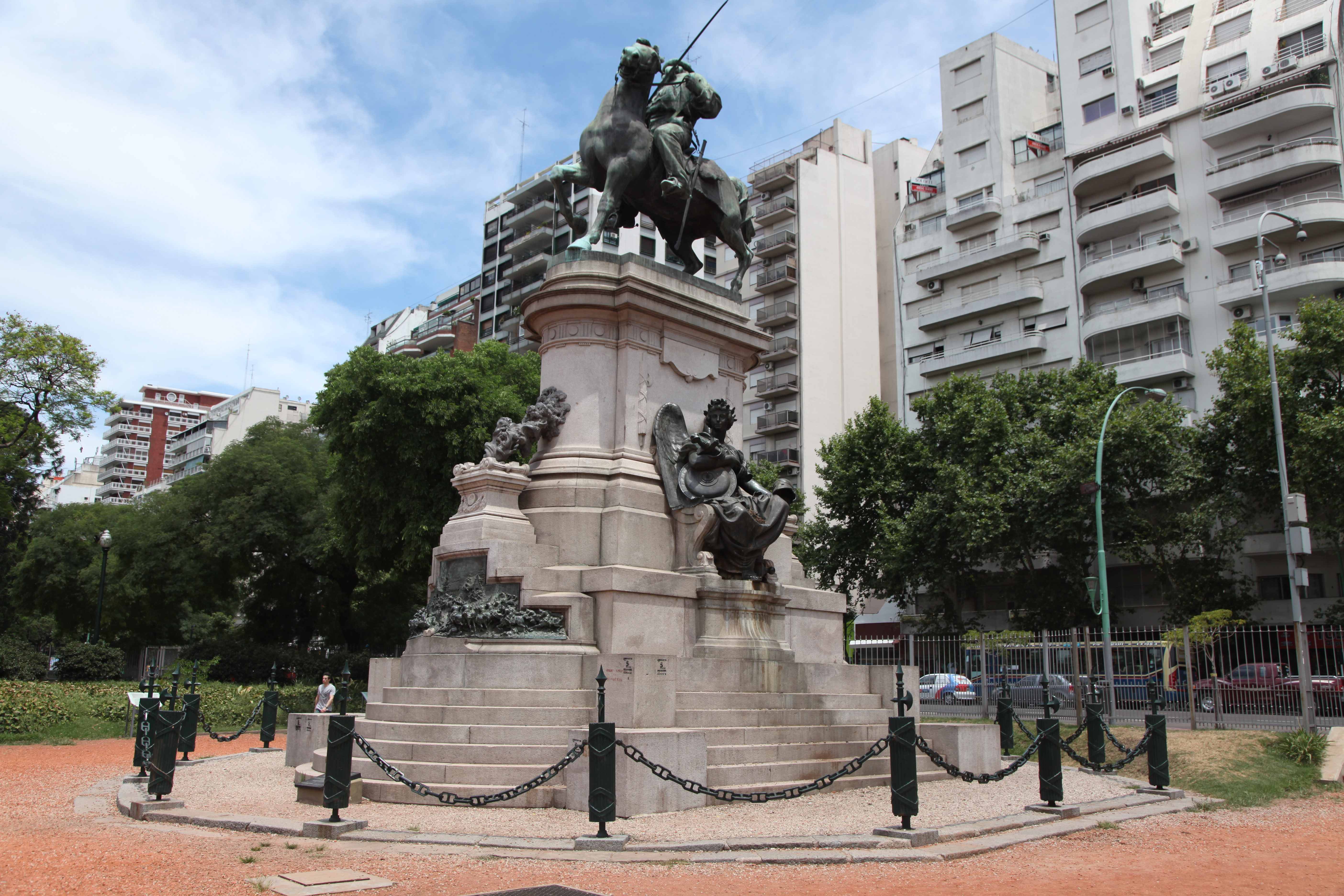 Palermo, Buenos Aires